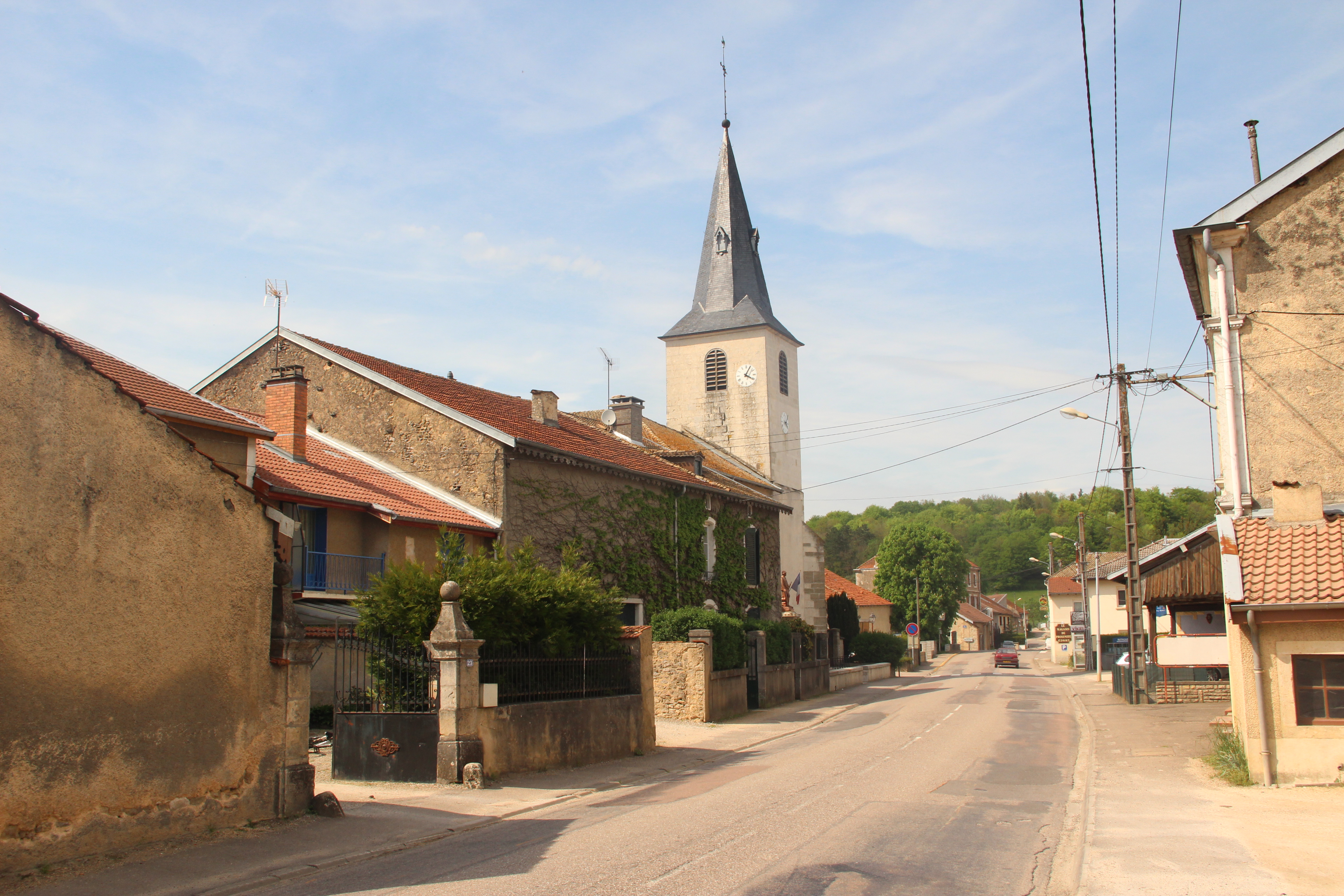 Jakobsweg by Niederkasseler France - Kirche Greux